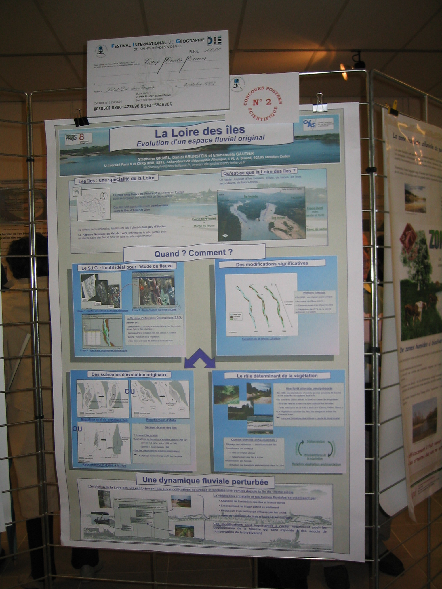 Concours de posters scientifiques au 14ème Festival international de géographie de Saint-Dié-des-Vosges (2003)